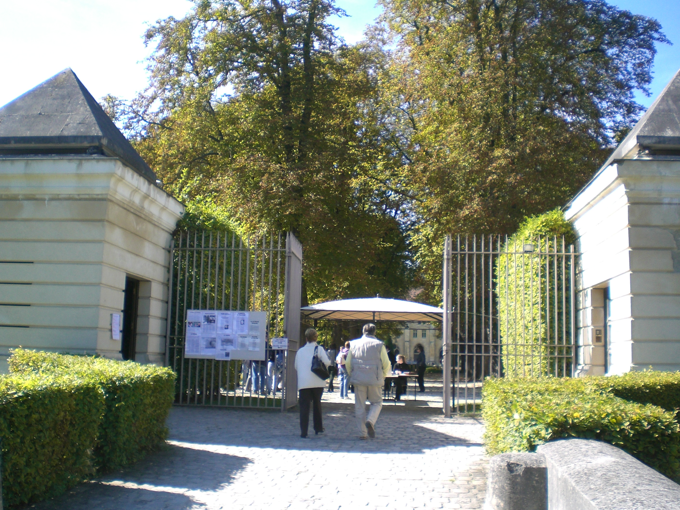 entree de l'abbaye de royaumont